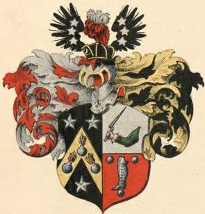 Balašovi suguvõsa aadlivapp